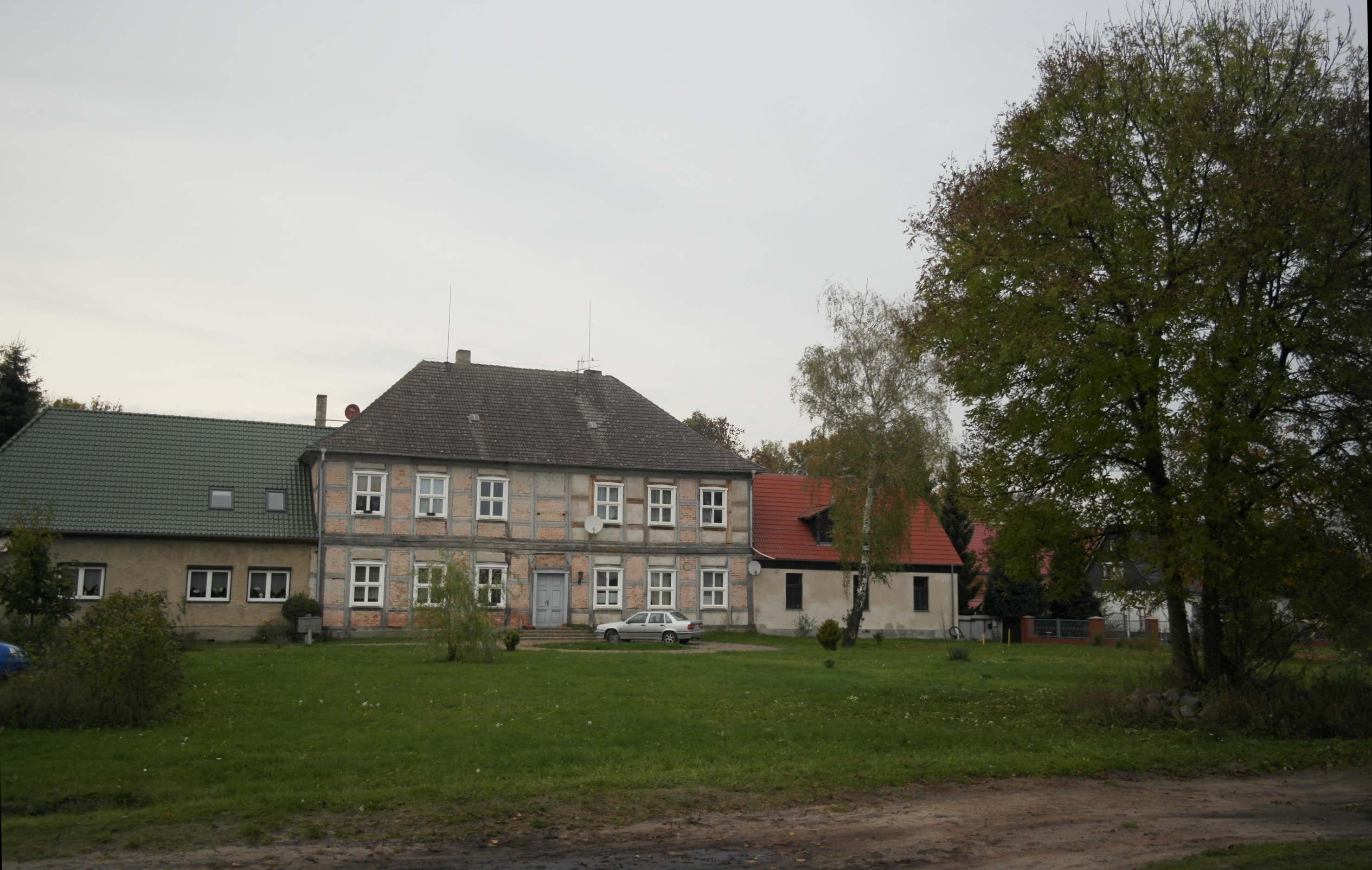 Gutshaus Wutike, denkmalgeschützt